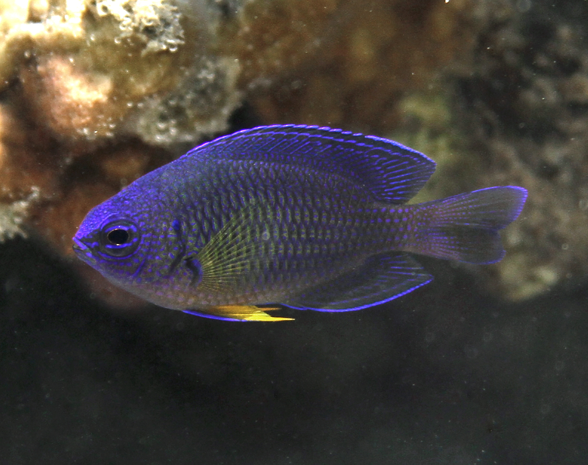 Une demoiselle Pomacentrus caeruleopunctatus à la Réunion.